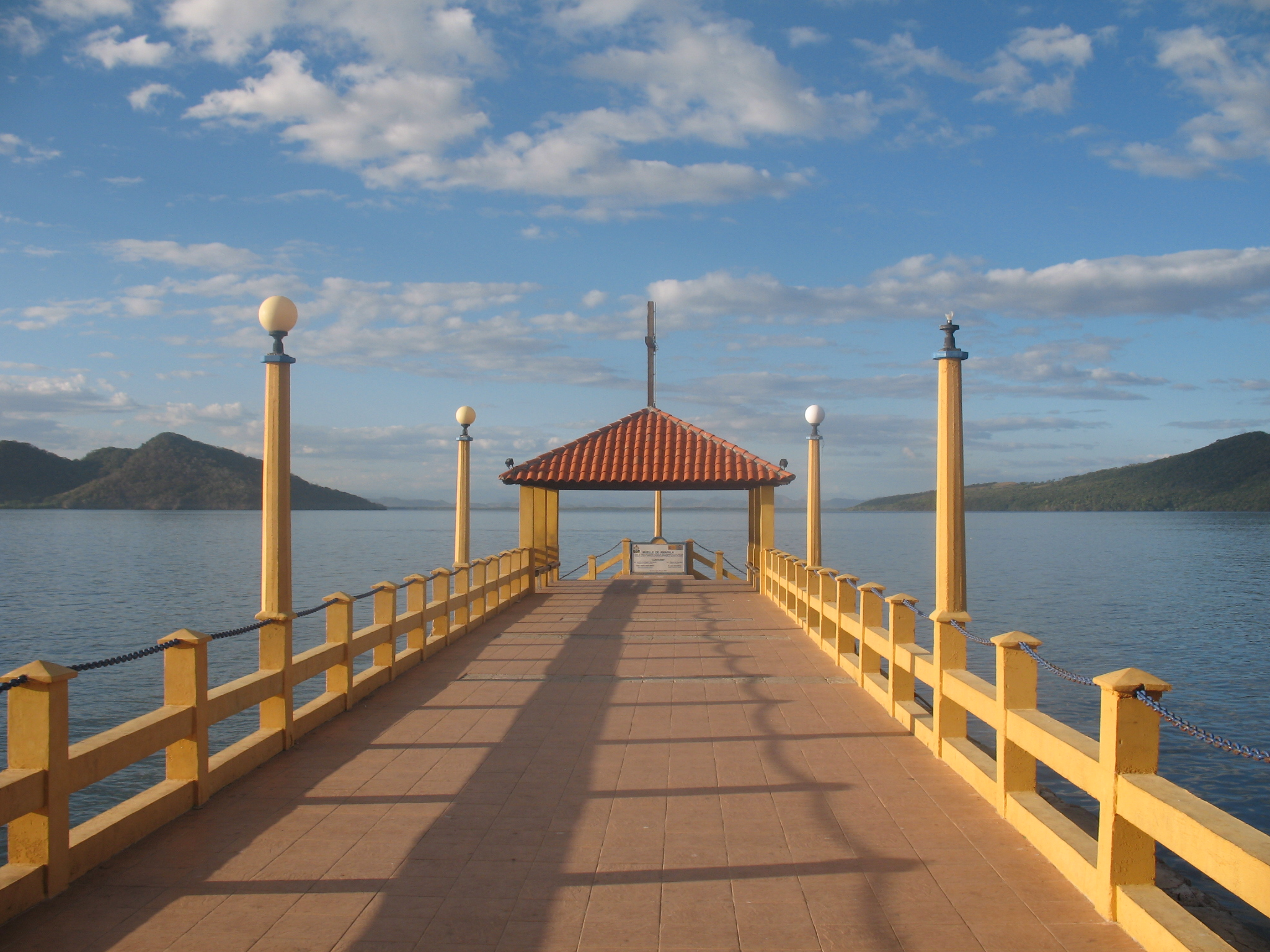 Fotografia del Puerto de Amapala, Honduras. Fotografia por : Dennis Garcia.